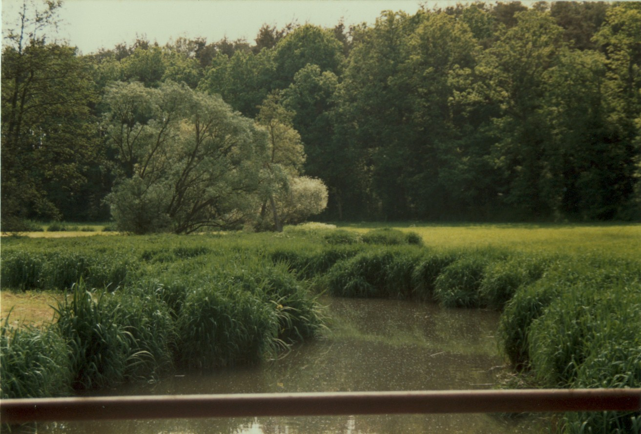 Aurach bei Roth (Mittelfranken)